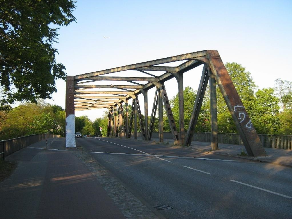 Brücke der B 188 über die Havel in Rathenow (Brandenburg).